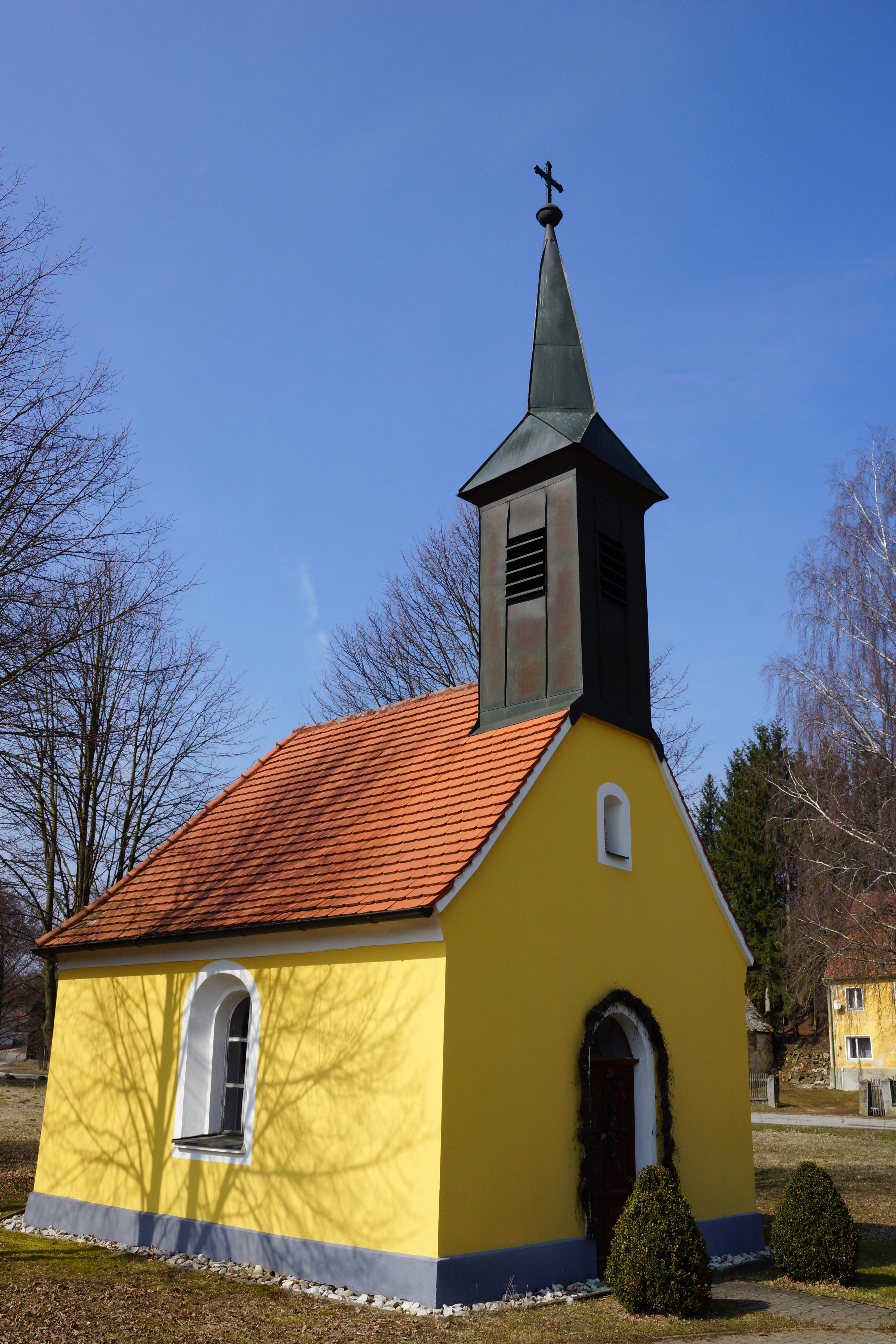 Die Herz-Jesu-Kapelle in Finsterweiling